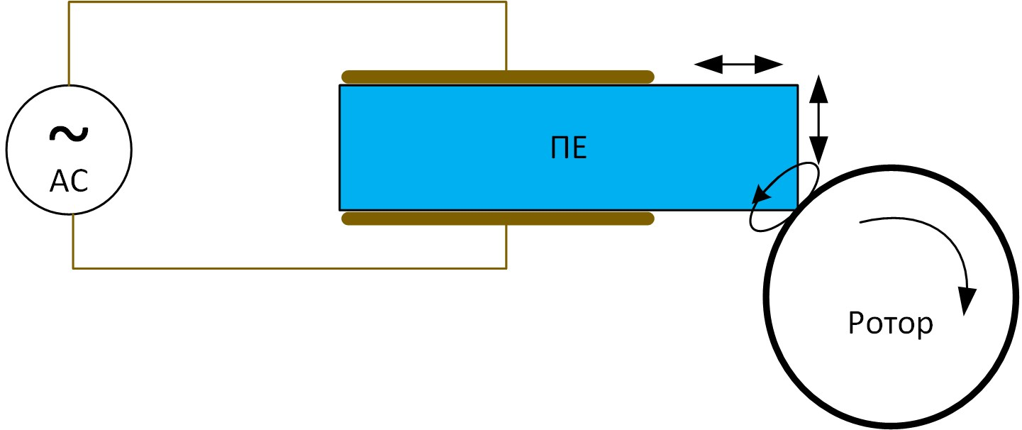 Пьезодвигун обертання